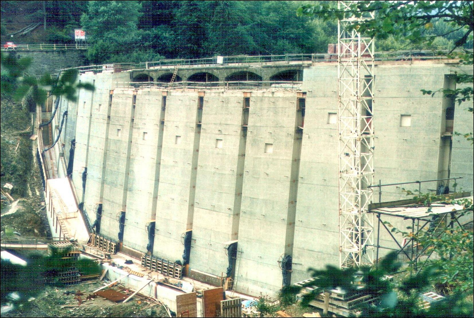 Fuelbecketalsperre